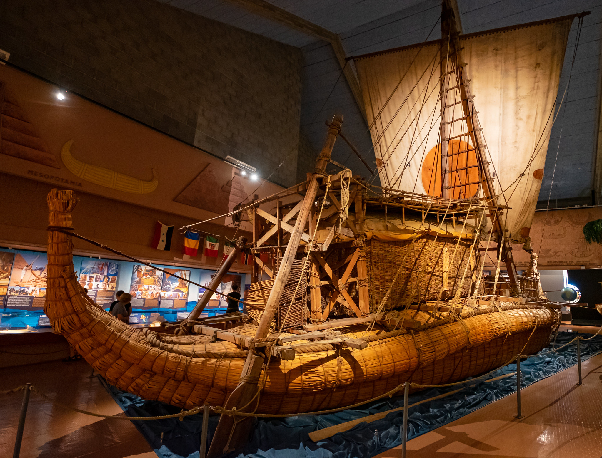 Nachbau der Ra 2 im Kon-Tiki-Museum Oslo